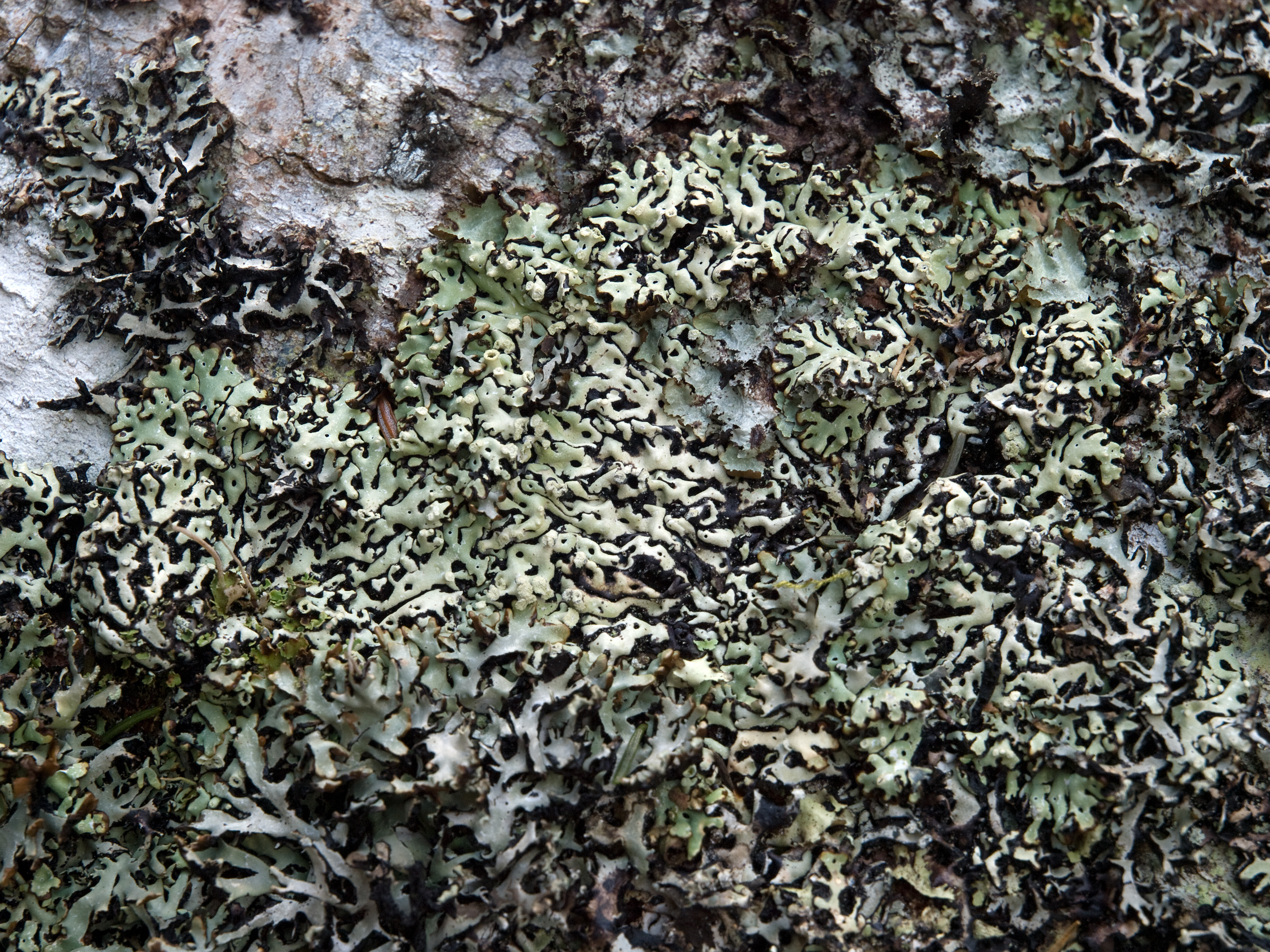 Blattflechte Menegazzia terebrata Picture taken in Berchtesgaden/Bavaria